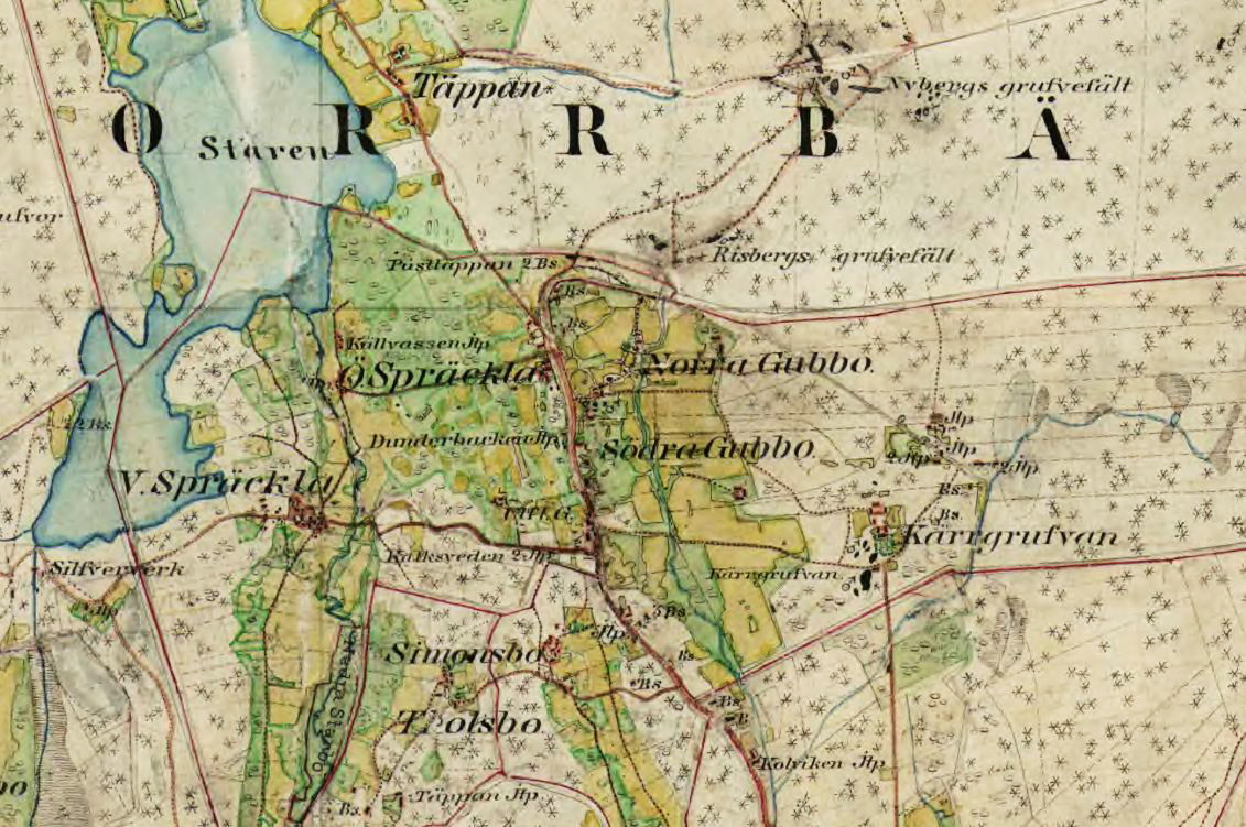 Del av Häradsekonomiska kartan 1866-73 visande Gubbo